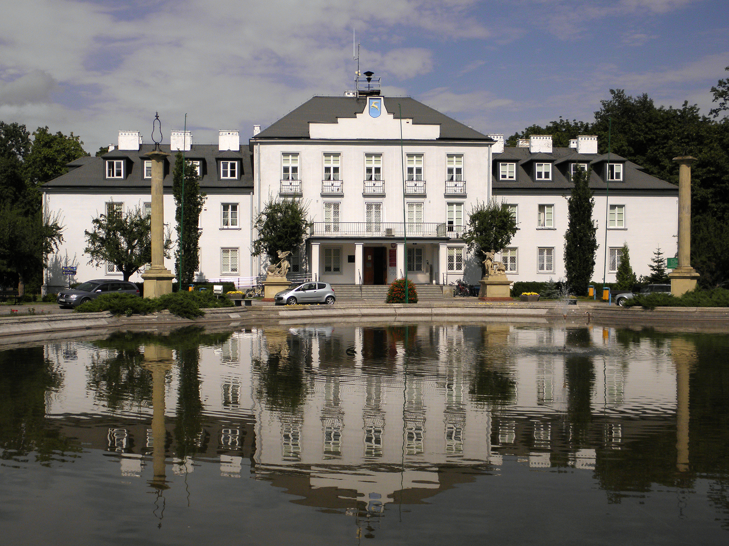 Kozienice, zespół pałacowy - budynek z lat 50-tych wzniesiony na miejscu spalonego pałacu (zabytek nr 315/A/67)